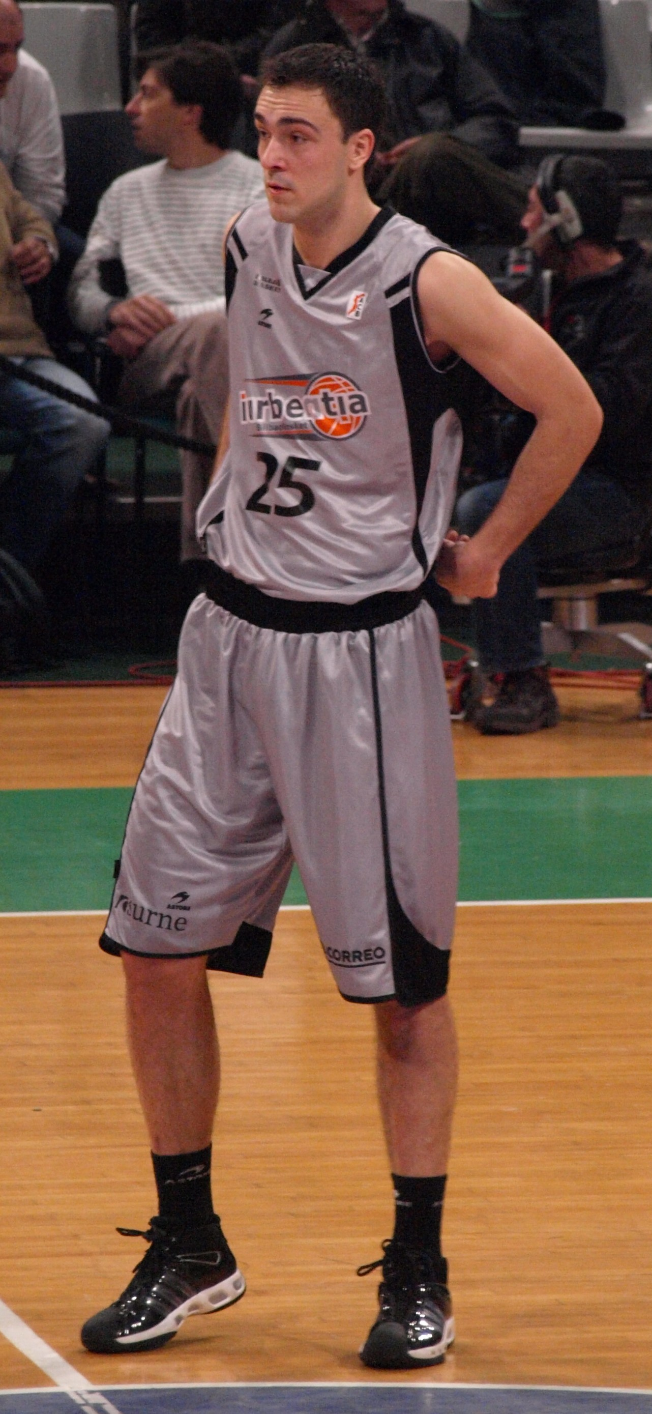 Damir Markota en el encuentro que enfrentó al Iurbetia Bilbao con el DKV Joventut de la liga ACB 2008/09 en el olímpico de Badalona